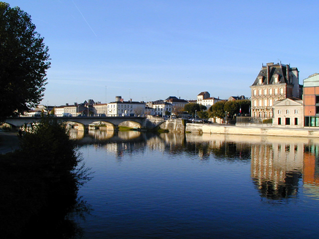 Jarnac, le pont et le château Courvoisier